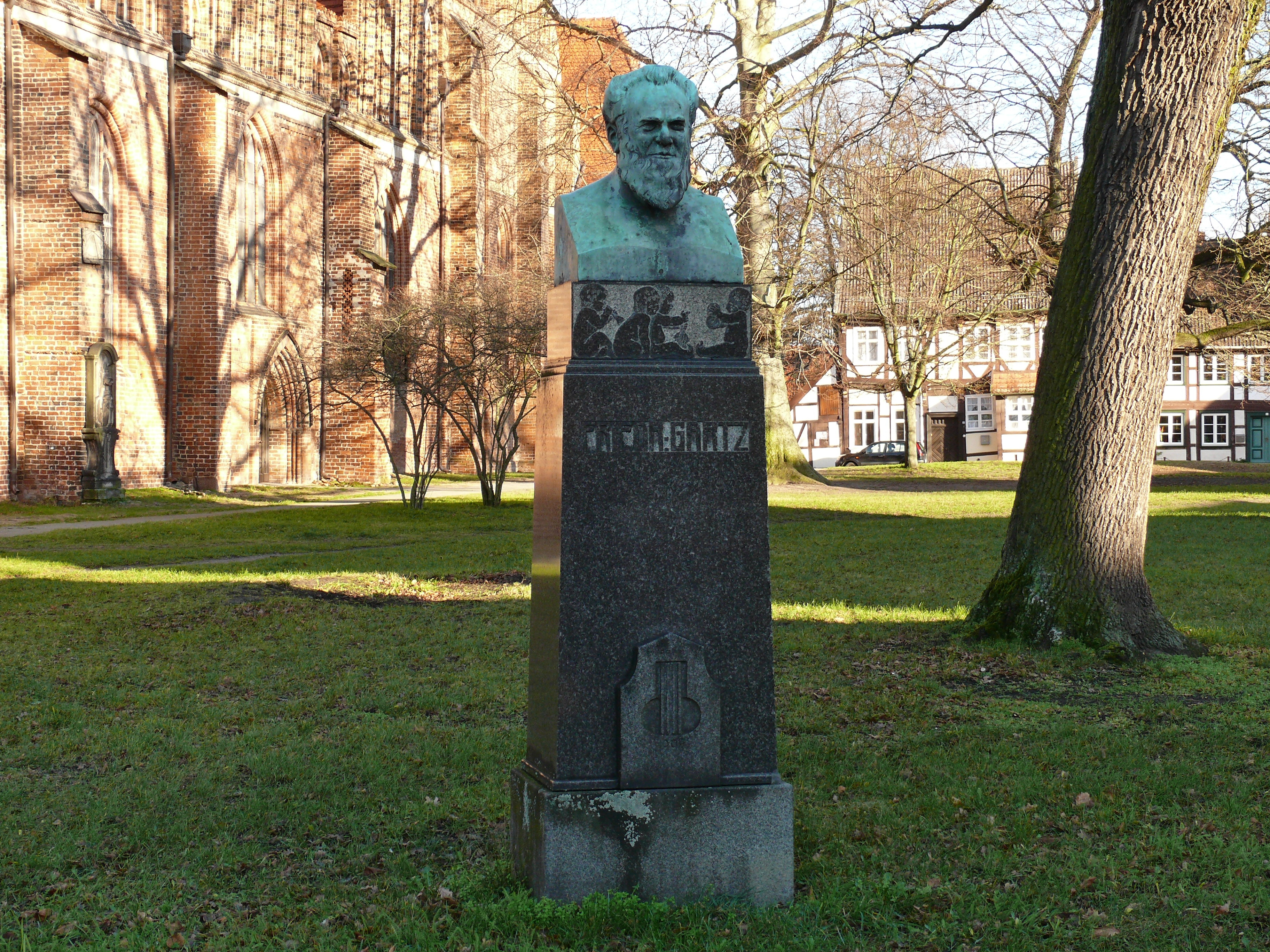 Denkmal zu Ehren des Komponisten Friedrich Gartz an der Katharinenkirche in der Hansestadt Salzwedel.